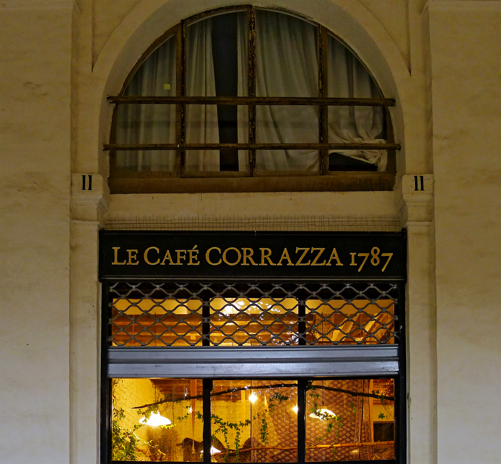 Café Corrazza (1787), Palais-Royal n° 11-12, galerie de Montpensier, Ier arrondissement, Paris, France.